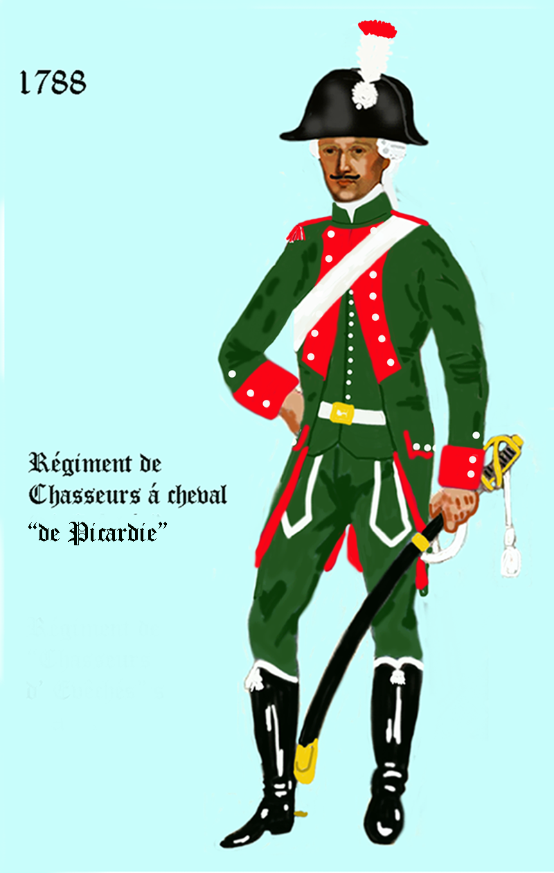 l'uniforme du régiment Chasseurs à cheval "de Picardie" de 1788